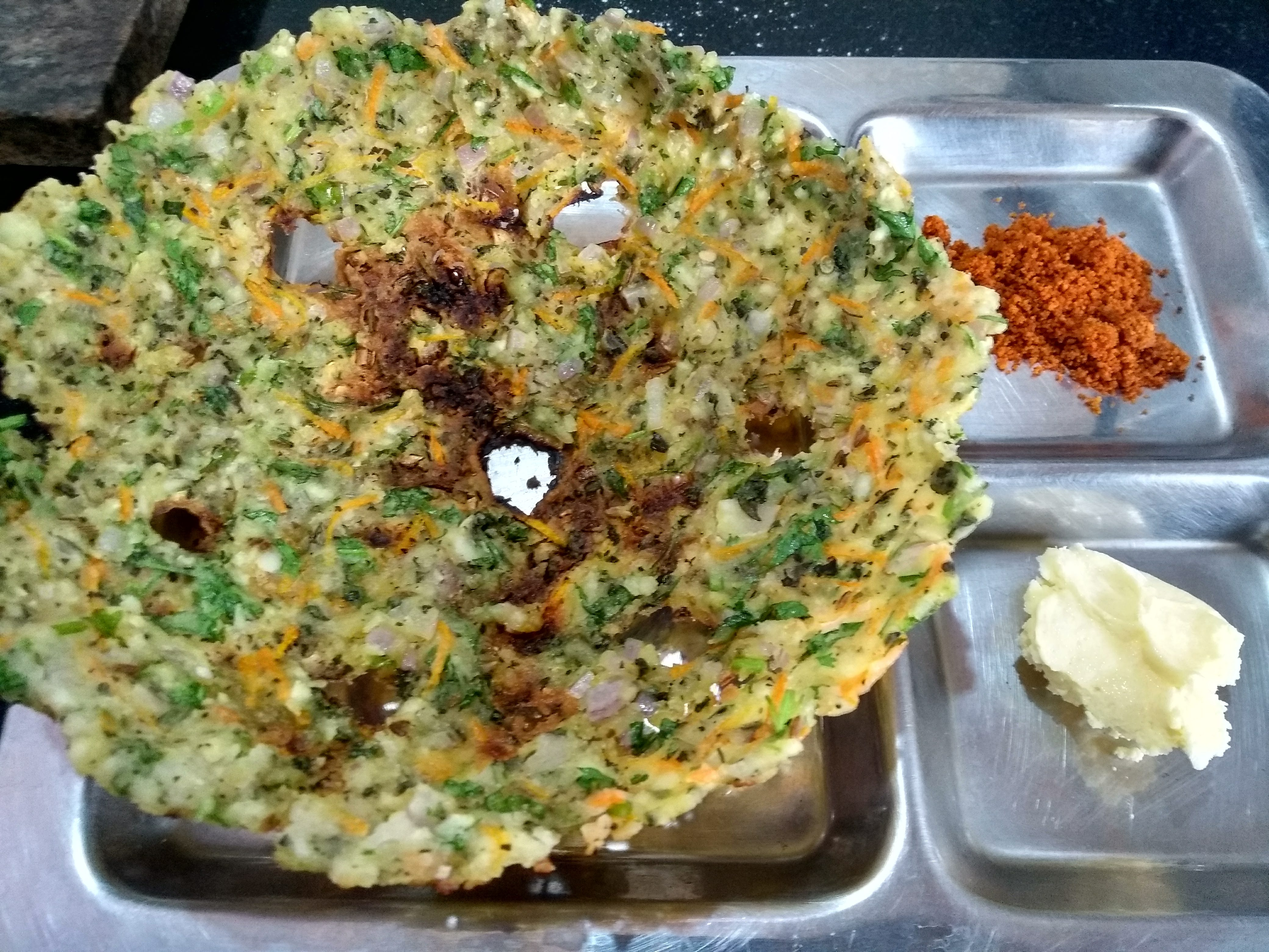 ಕನ್ನಡ: ಅಕ್ಕಿ ರೊಟ್ಟಿ ಬೆಣ್ಣೆ ಮತ್ತು ಚಟ್ನಿ ಪುಡಿಯೊಂದಿಗೆ ಸವಿಯಲು ಸಿದ್ಧ